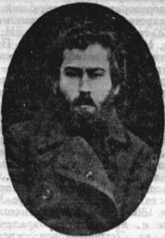 Арончик Айзик Берович - русский революционер, народник, член партии "Народная воля"